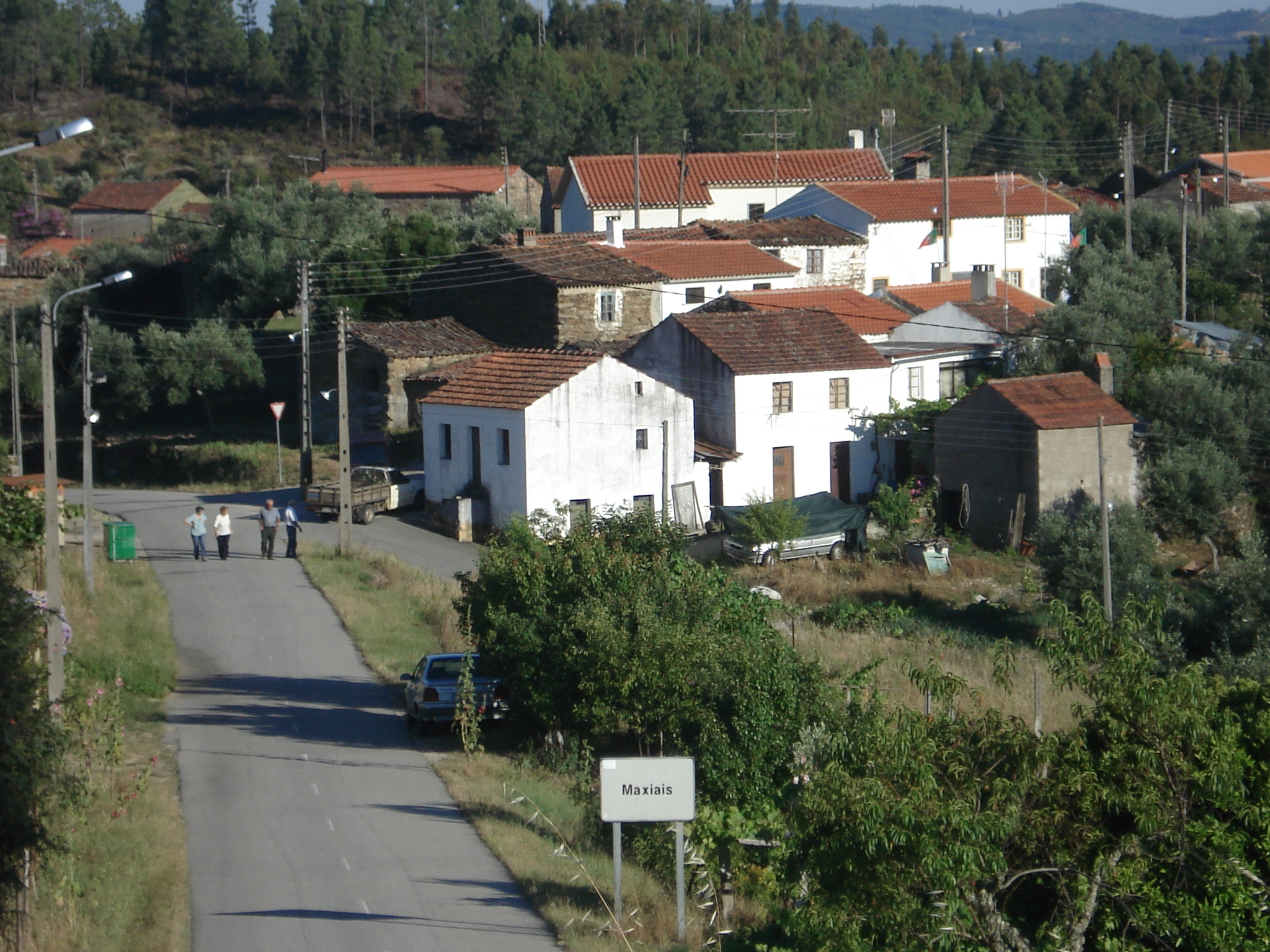 Maxiais, Sobreira Formosa, Portugal, Junho 2008